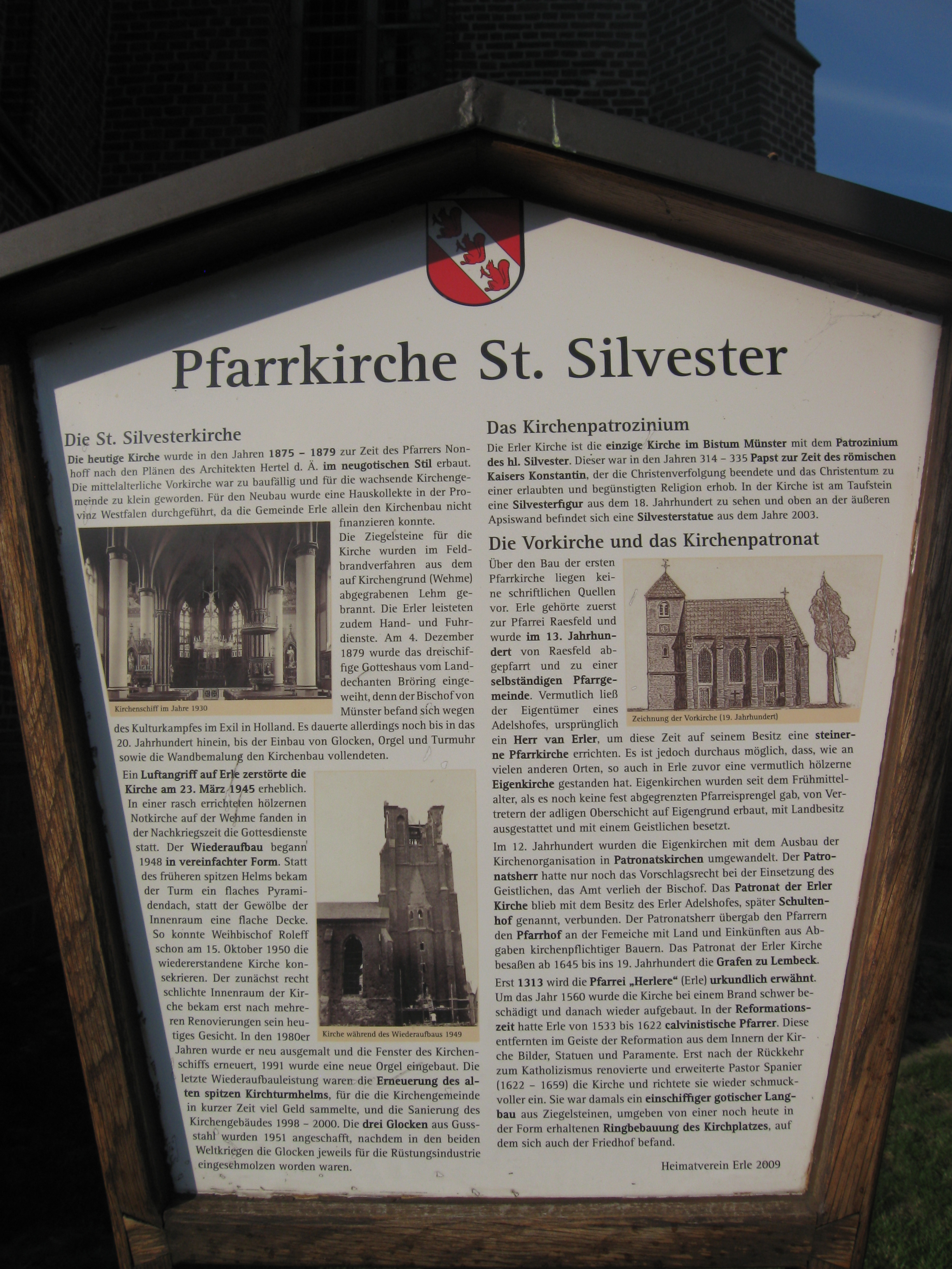 Iglesia San Silvestro en Raesfeld-Erle